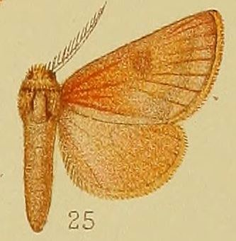 Clostera ferruginea